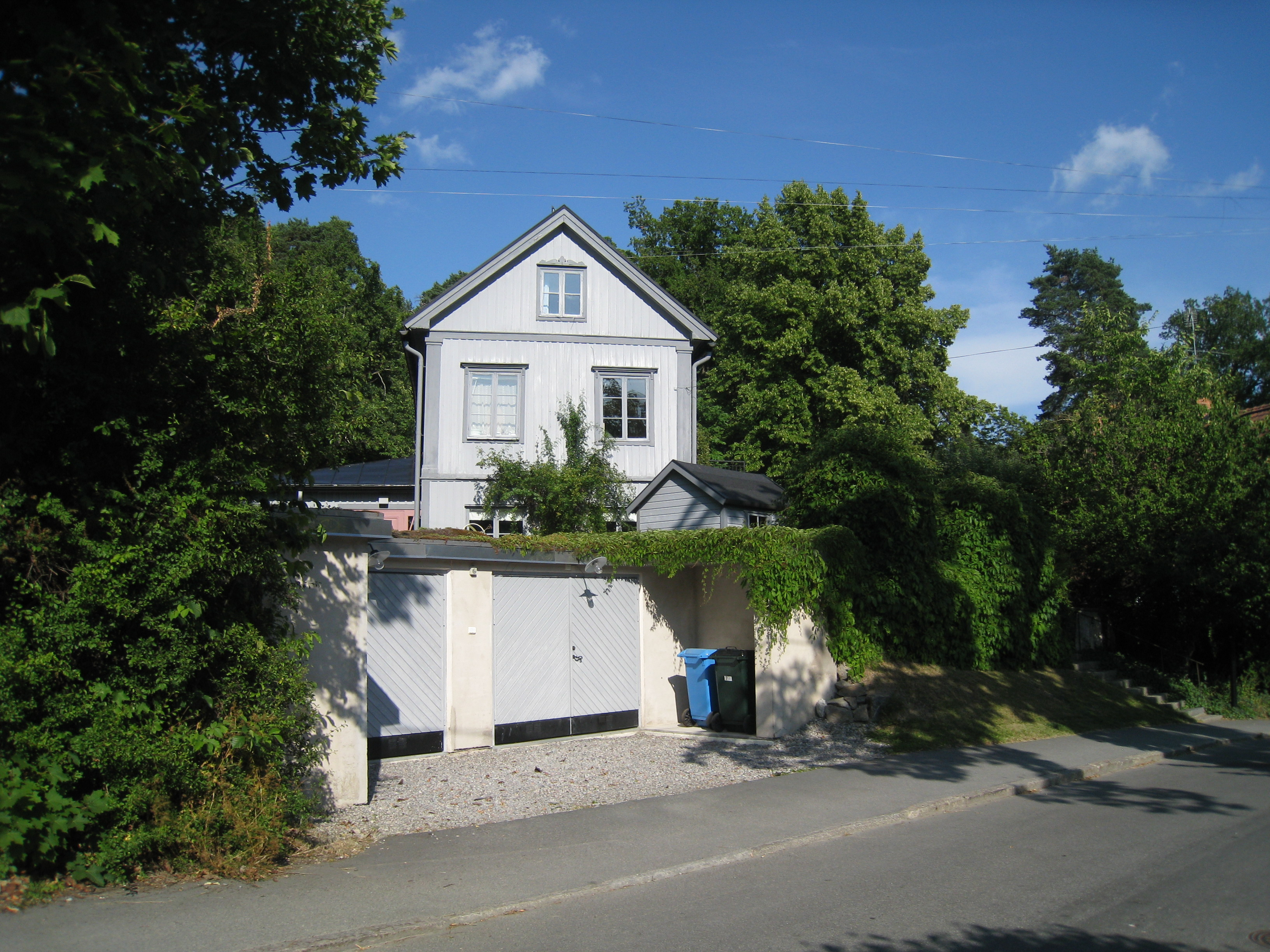 Äppelvikens gård, Äppelviksvägen 31, Bromma, väster om Stockholm. På 1750-talet tillkom de äldsta delarna av detta hus. Namnet Äppelviken kommer från detta torp, som numera är villabostad. Äppelviksvägen leder ned till viken vid Mälarstranden.